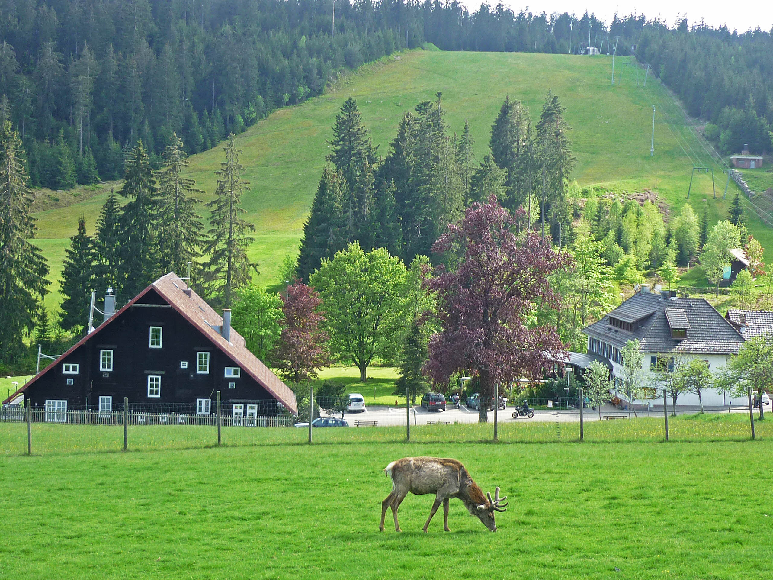 Kaltenbronn, Lkr. Rastatt im Schwarzwald